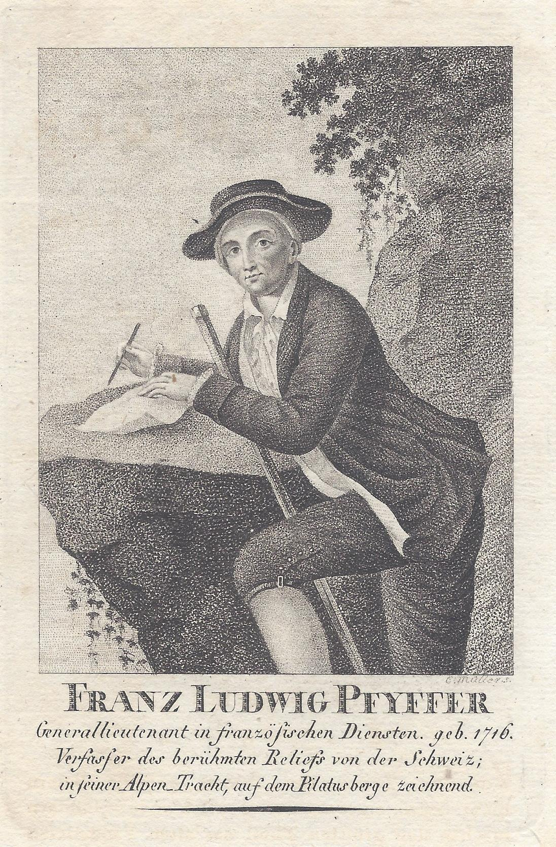 Franz Ludwig Pfyffer zeichnend auf dem Pilatus, Punktierstich nach der Vorlage von Christian von Mechel 1786